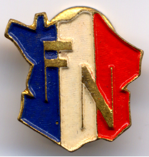 Insigne du Front National années 40-45 ? Laiton peint. Peut-être une réplique.